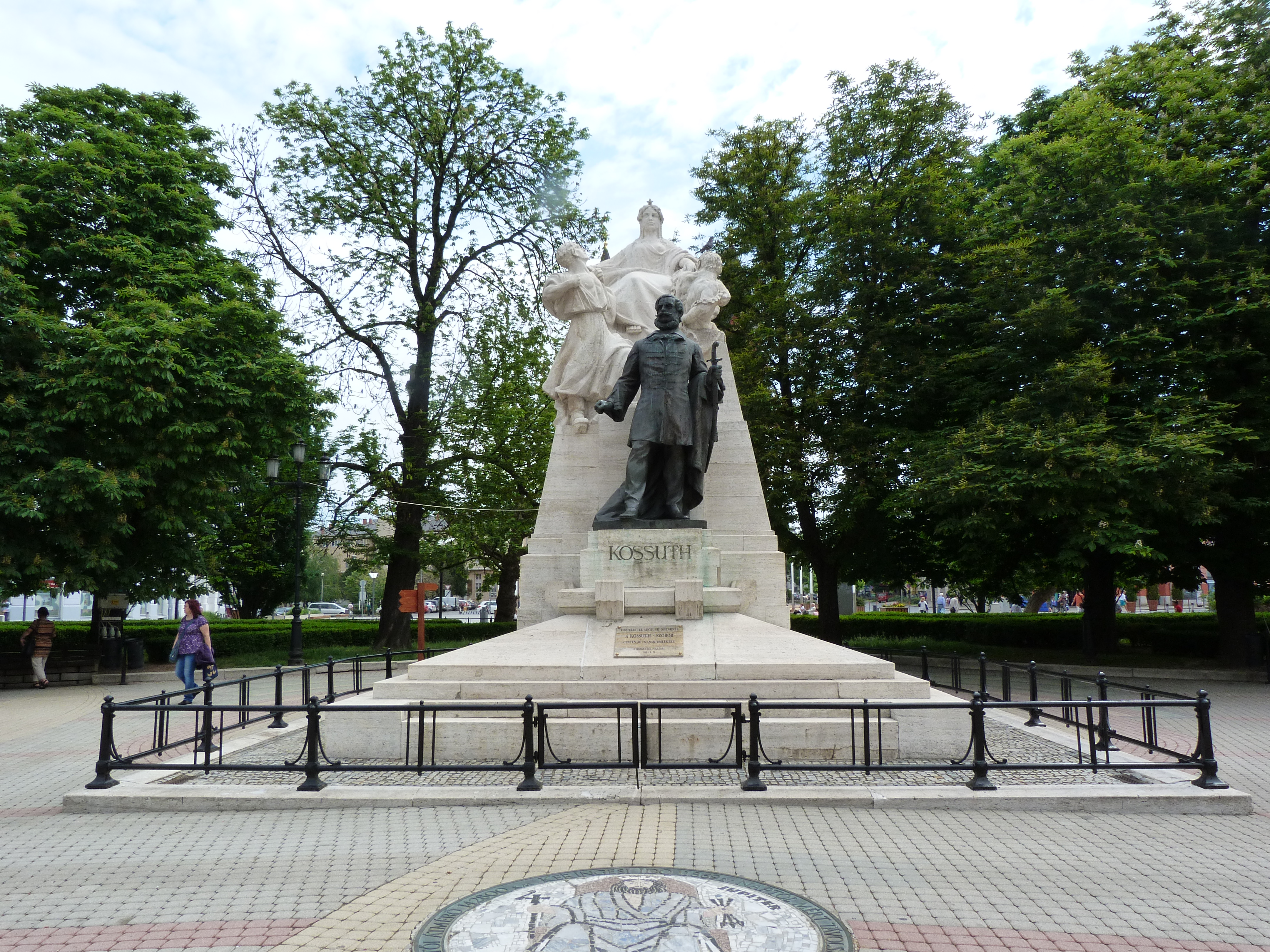 A felvétel 2013. Május 17 –én pénteken készült Nyíregyházán. ©© Derzsi Elekes Andor, Budapest, 2013, A kép és filmfelvételek egészben, vagy részletekben másolását, bármilyen úton történő sokszorosítását és felhasználását a szerző ellenérték nélkül, jogutódjaira is kihatóan megengedi. Az engedély kiterjed a kereskedelmi célú hasznosításra is. Kéri azonban nevének feltüntetését a felhasználás során. A Metapolisz sorozat valamennyi képe és filmje Creative Commons alatti valamint kereskedelmi - for profit - célra is felhasználható. Ajánlott hivatkozás: Derzsi Elekes Andor: Metapolisz DVD line